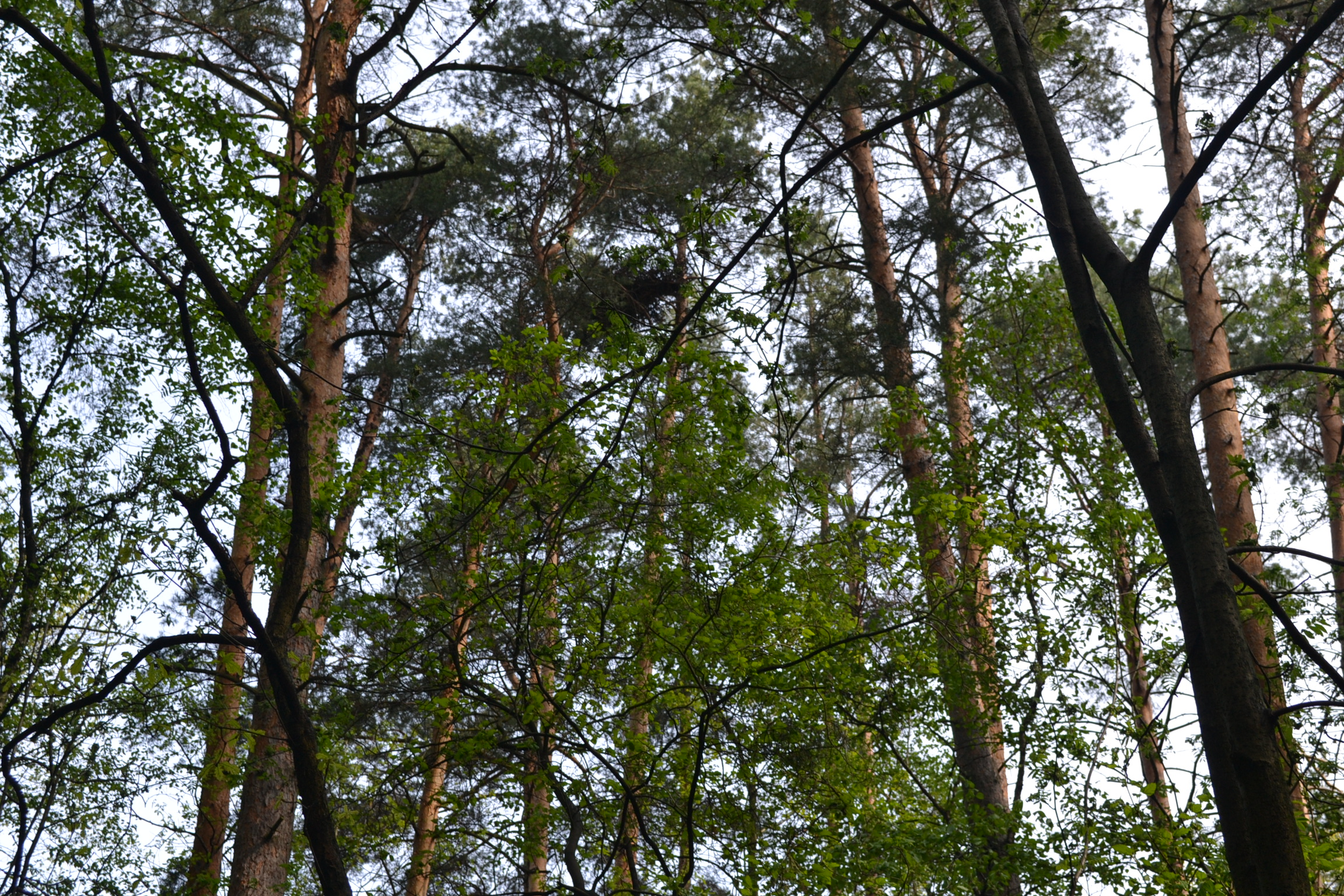 Весна в лесу